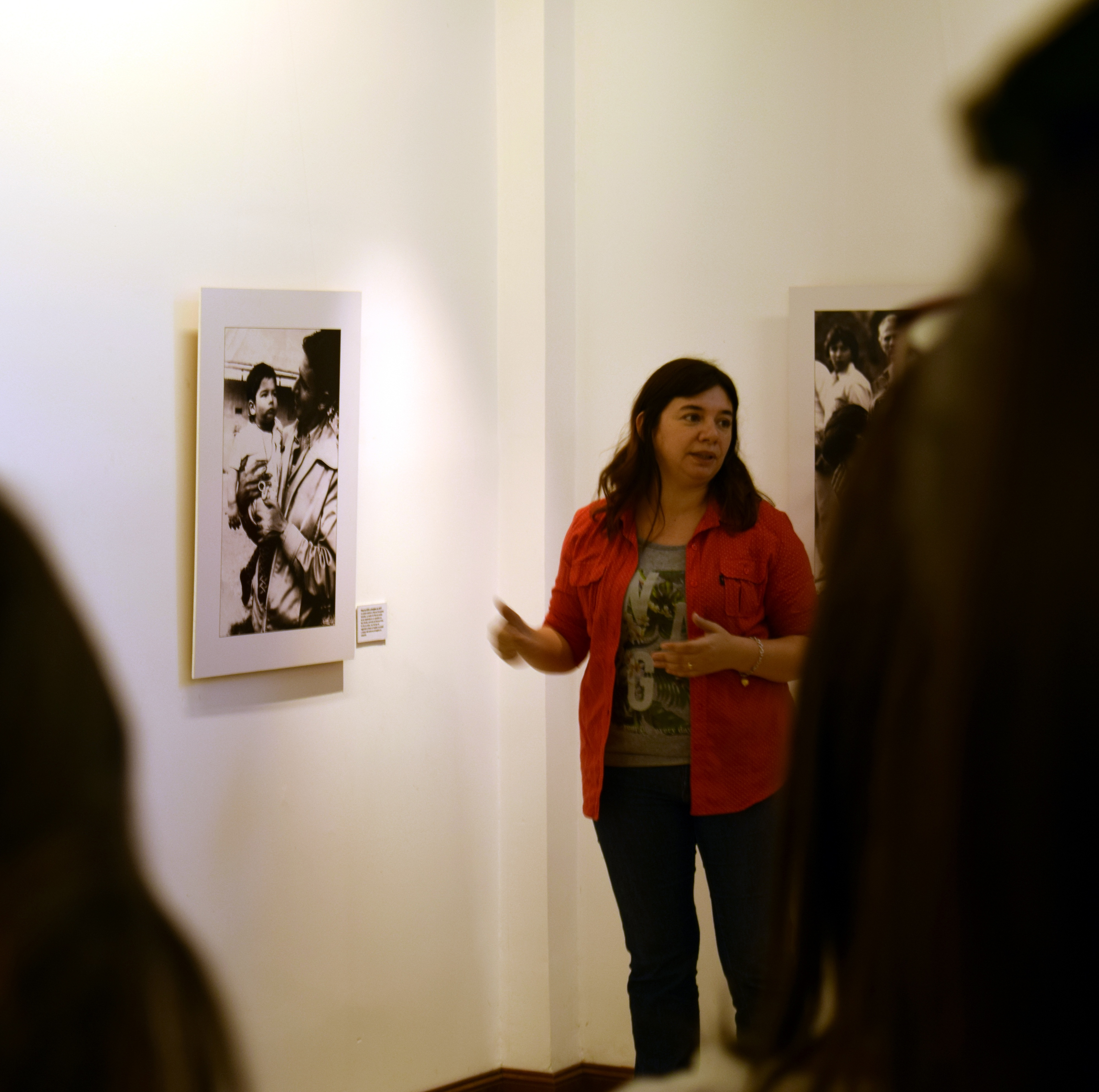 Lorena Battistiol Colayago dando una guiada en la Casa por la identidad. Es nieta de María de Colayago, una de las abuelas de Plaza de Mayo e hija de Juana Colayago y Egidio Battistiol. Sus padres fueron secuestrados durante la última dictadura militar en 1977 y permanecen desaparecidos. Su madre esperaba un bebé al momento de estar detenida en el centro de detención clandestino que funcionó en Campo de Mayo.